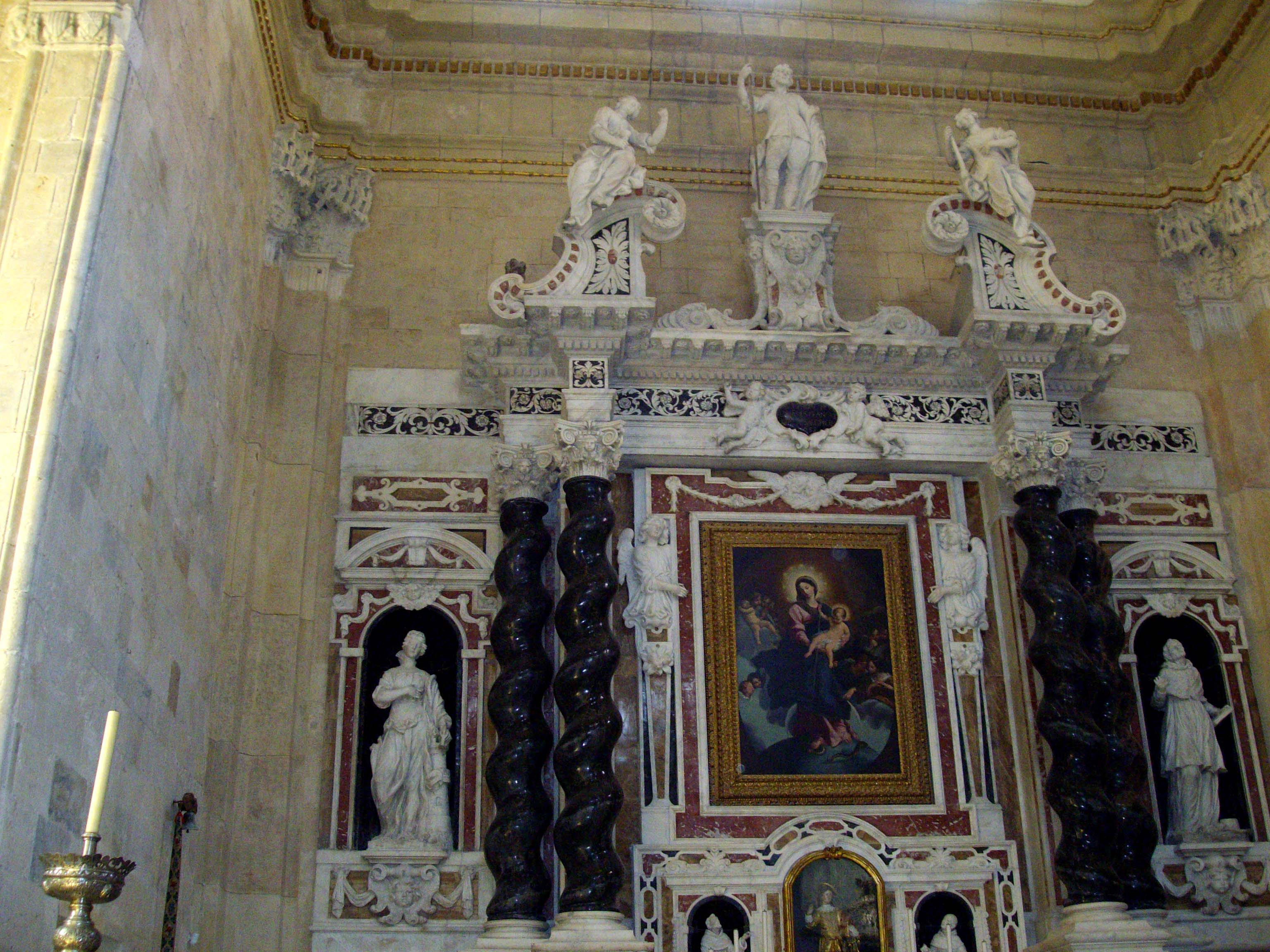 Altare di Sant'Isidoro (XVII secolo) nel Duomo di Cagliari